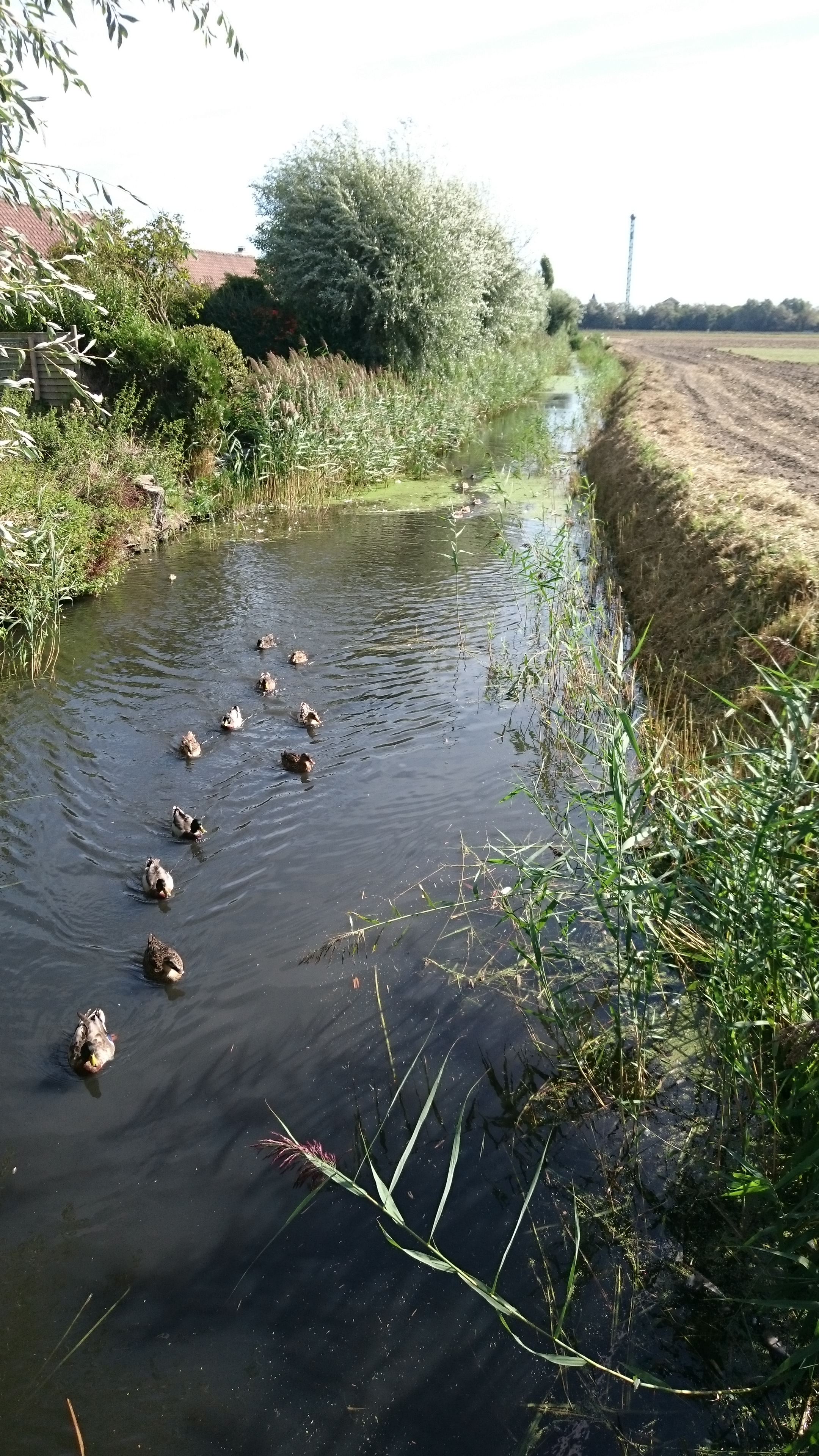 Le ruisseau Langgeleed à Adinkerque.